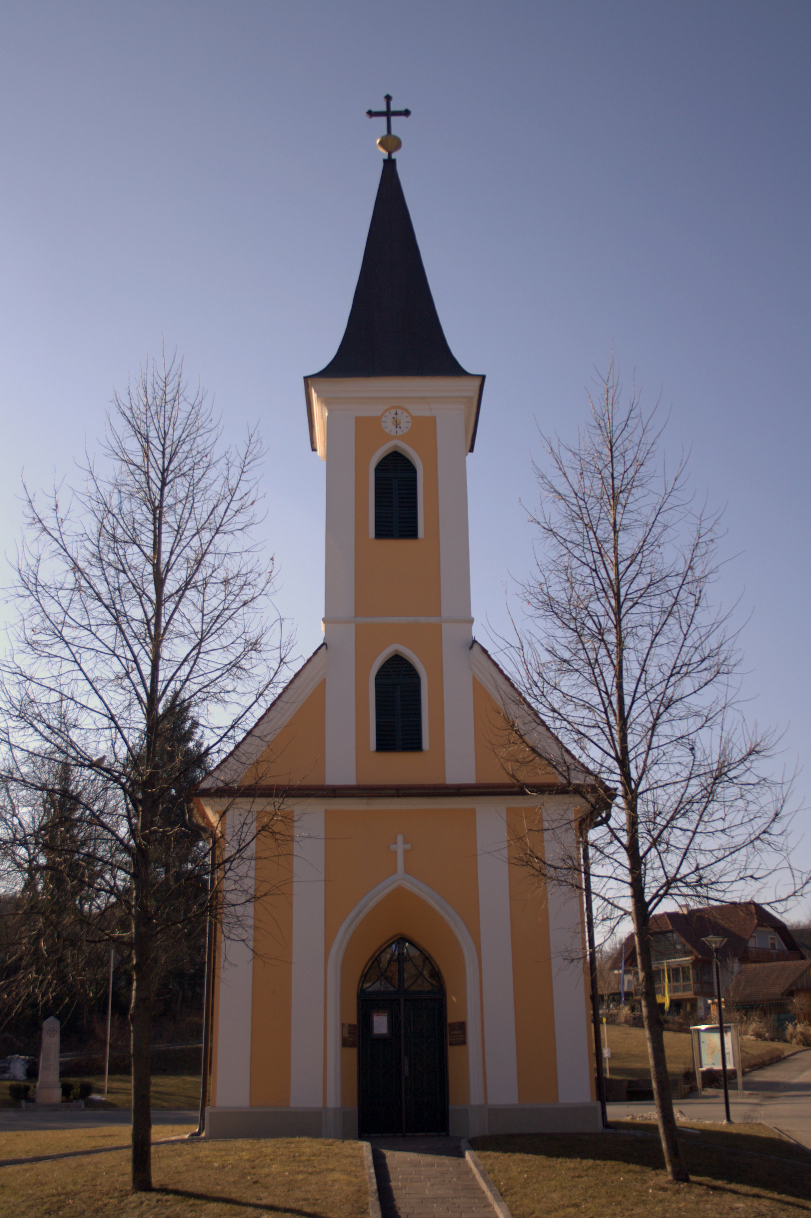 Oberrohr Ortskapelle